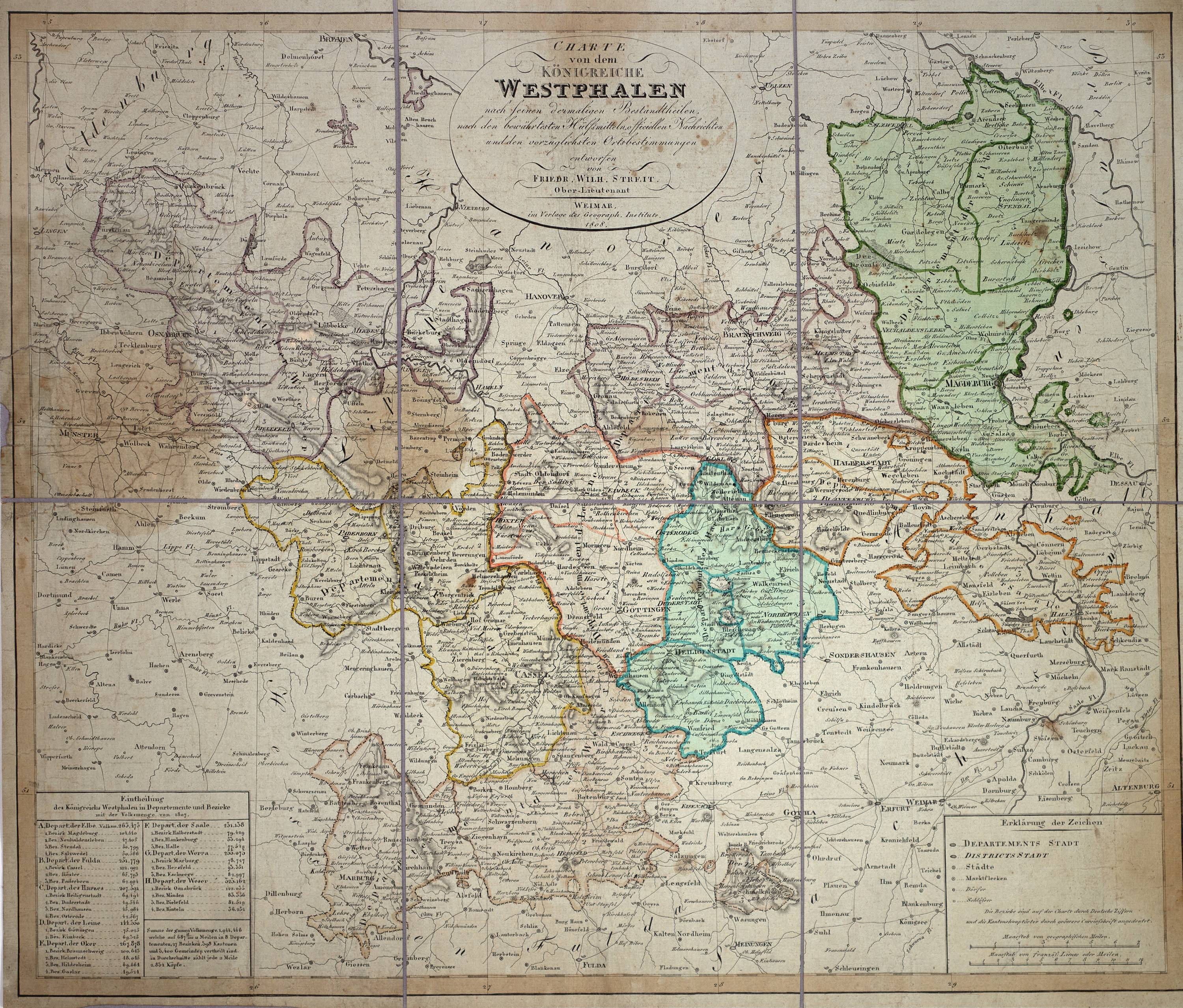 Karte des Königreichs Westphalen, 1808 (Hessisches Staatsarchiv Marburg Karten Nr. P II 19459). Zum Archivale